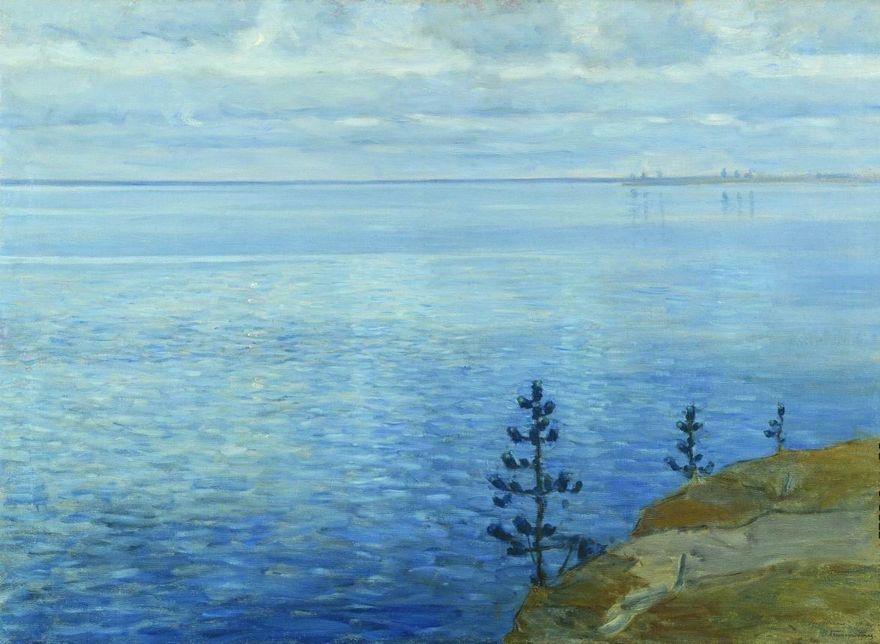 Час тишины. Озеро Удомля Год создания 1911 Материал Холст, масло. Размер 94 x 131 Собрание Национальный художественный музей Республики Беларусь